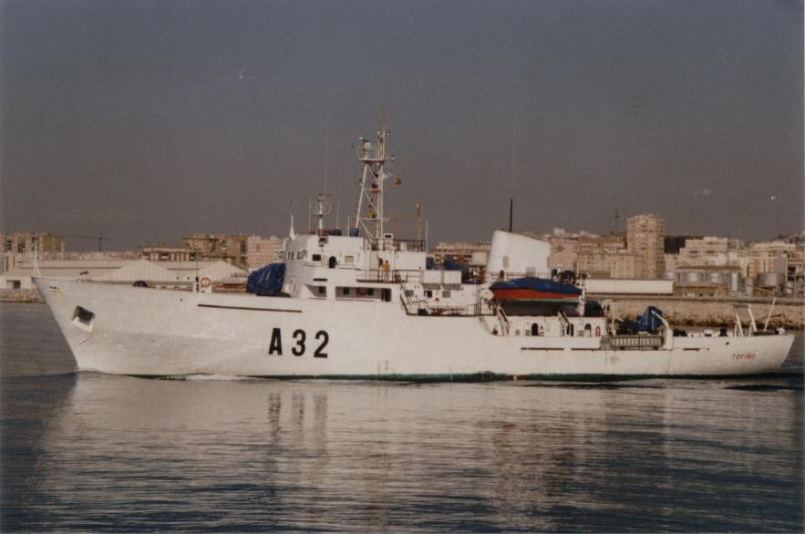 Buque hidrográfico de la Armada Española Tofiño (A-32)